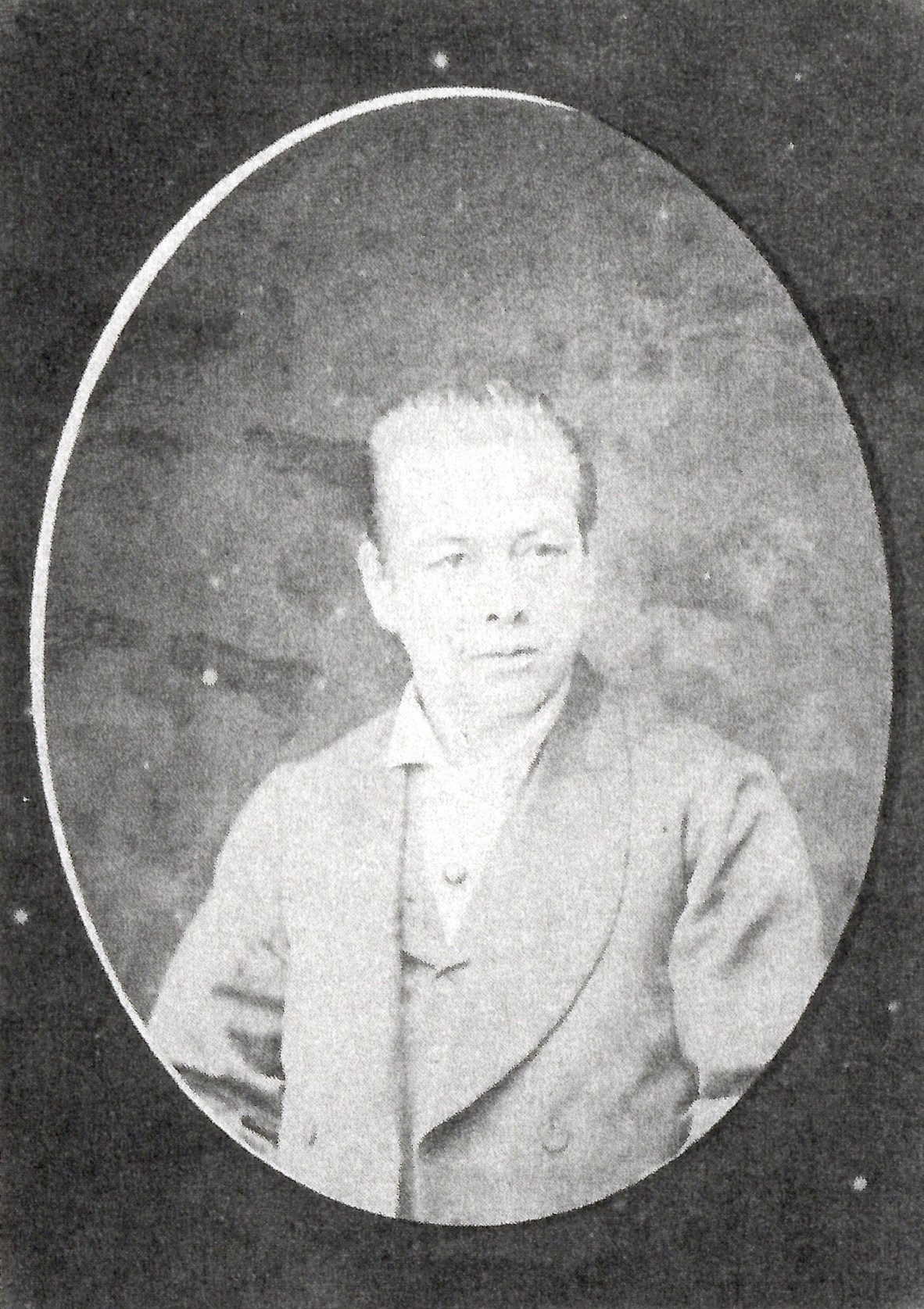 丹羽氏中の肖像写真。